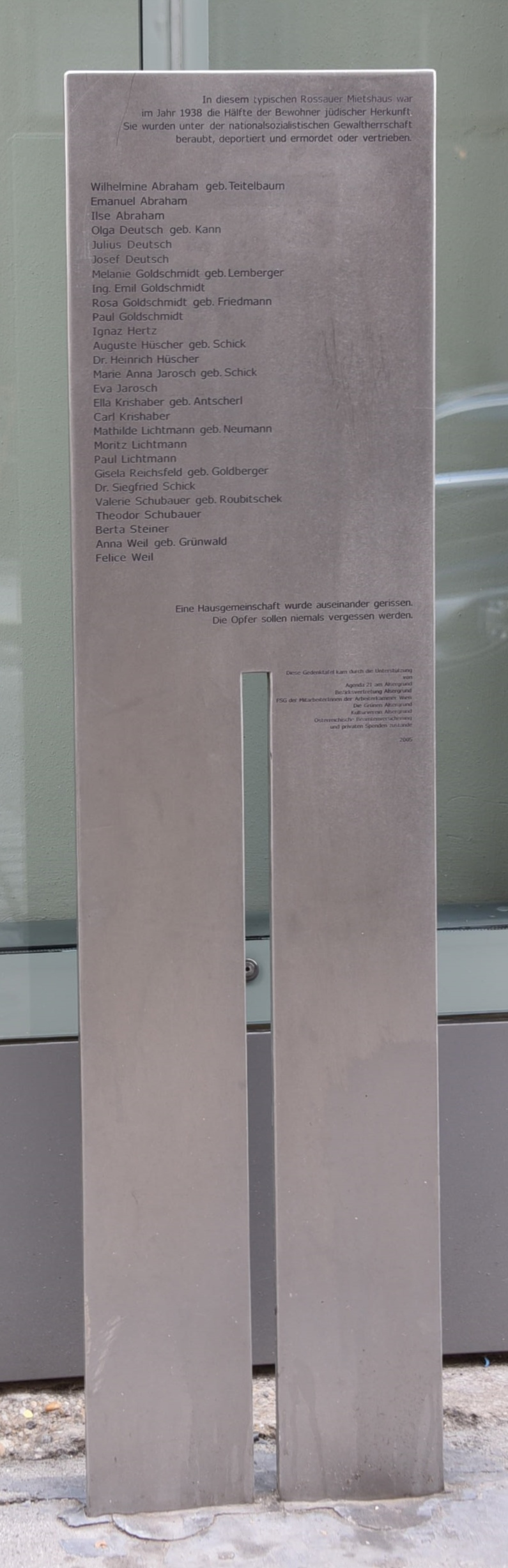 Gedenktafel Servitengasse 6, Projekt Servitengassen 1938